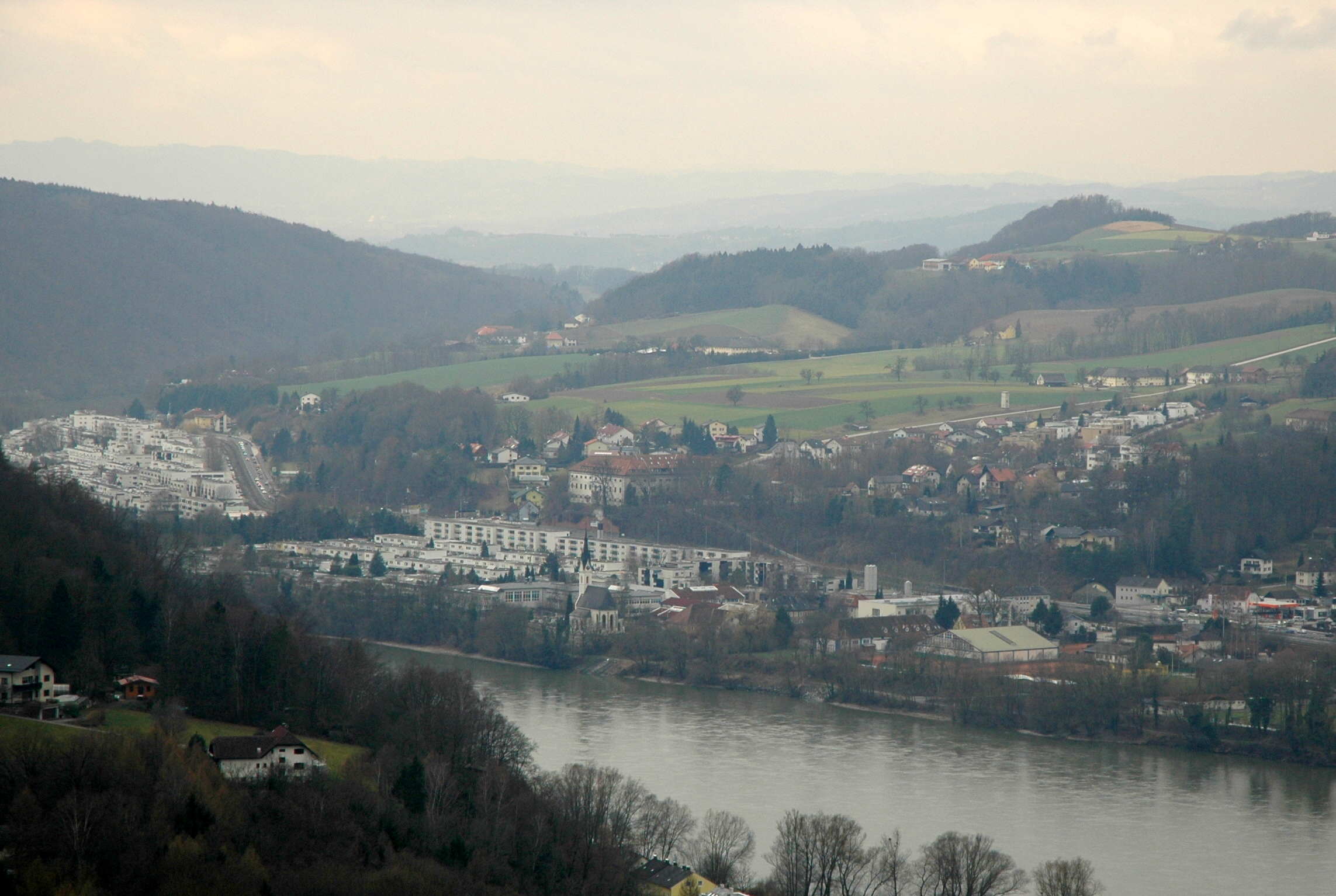 Puchenau (an der Donau, in Oberösterreich) von Südosten her gesehen. Die weiße Bebauung an der Donau ist die "Gartenstadt" I und II. Foto wurde von der "Franz Josef Warte" am Linzer Römerberg bzw. Freinberg an der Grenze zu Leonding aufgenommen.